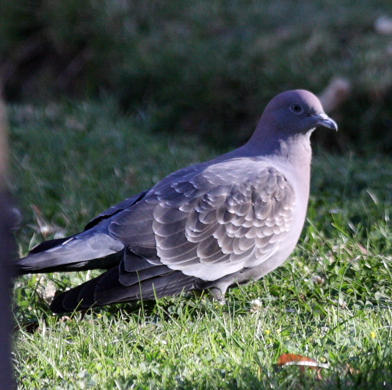 Spot-winged Pigeon (Patagioenas maculosa)